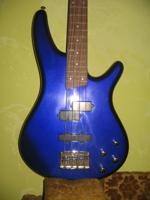 Ibanez SDGR DX 300 fretless bass / trup